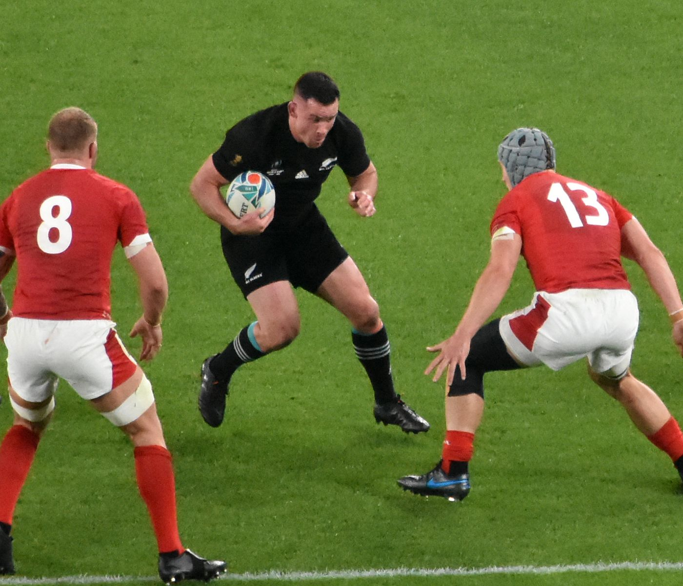 ラグビーニュージーランド代表